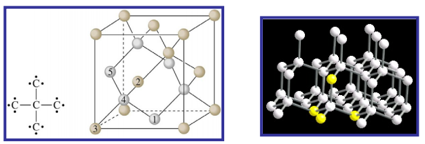 Diamantearen egitura